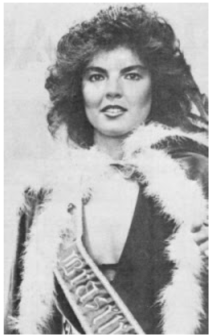 Carla Pompeu, artista plástica e escritora brasileira.